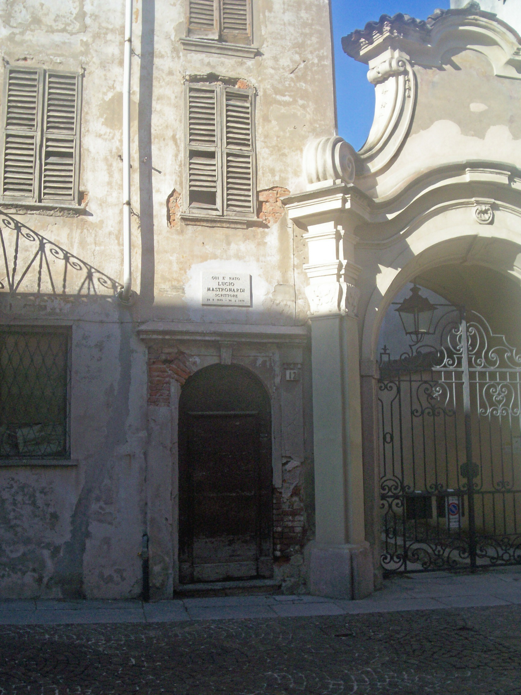 Fotografia della casa ove nacque lo scrittore Lucio Mastronardi: Vigevano (PV), via San Francesco n. 12